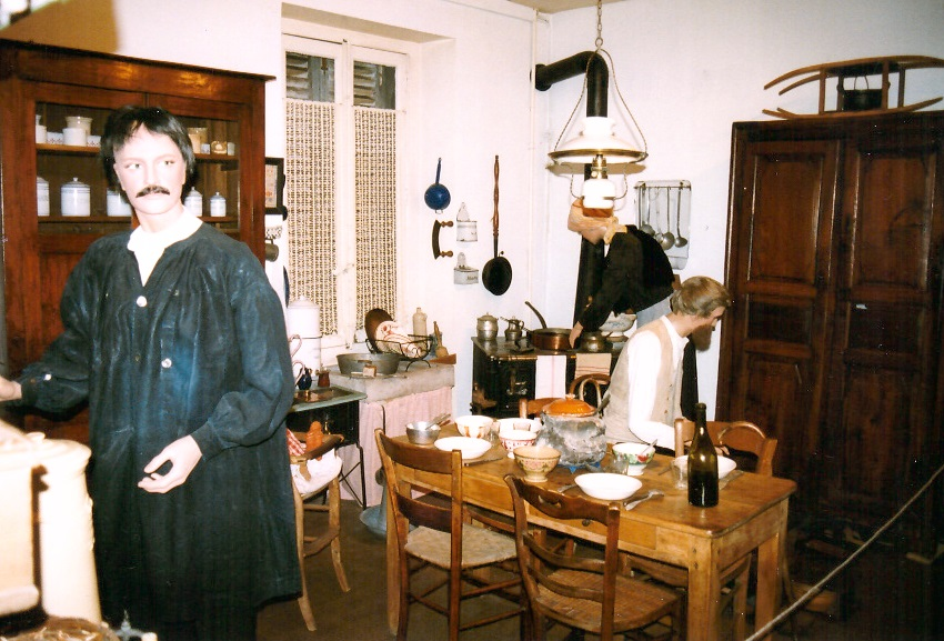 Musée du Hurepoix (Palaiseau) - Salle Commune chez les Maraîchers